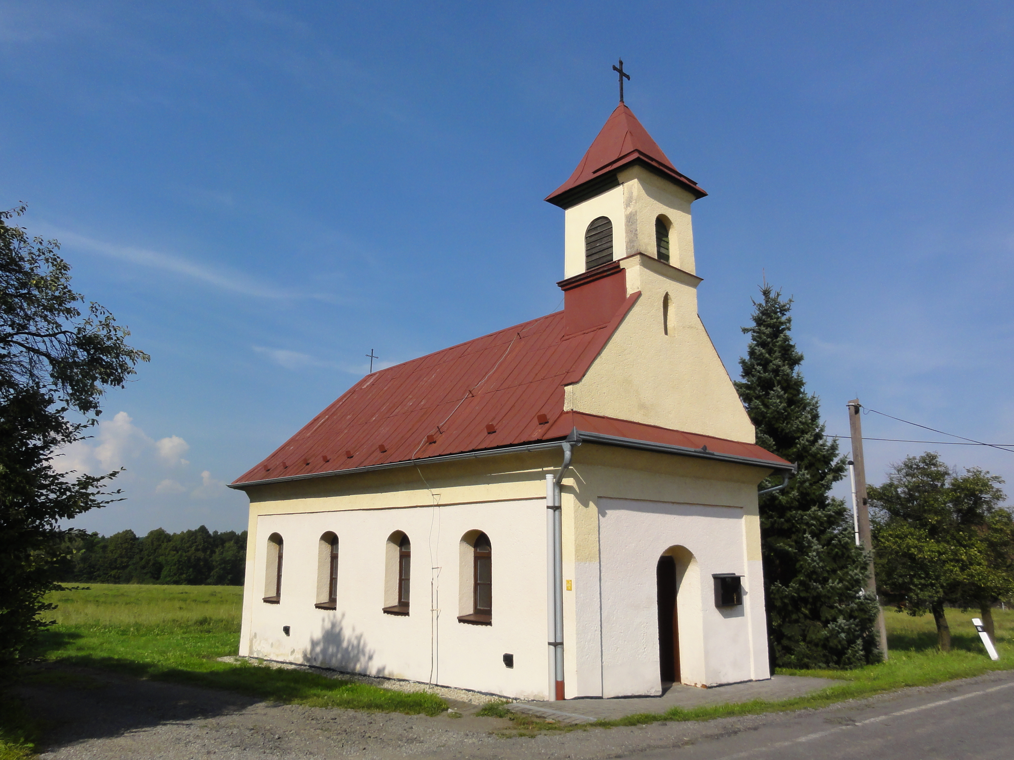 Kaplica św. Jadwigi w Kaniowicach